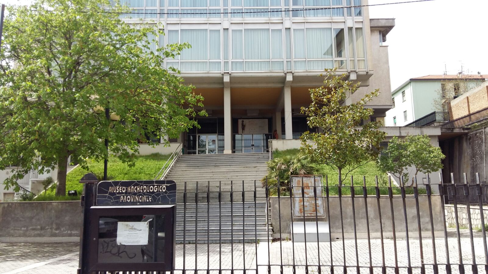 Entrata principale del Museo Archeologico di Potenza